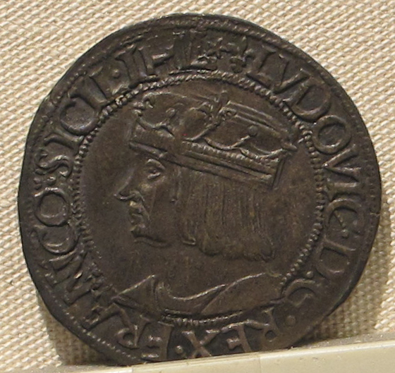 Palazzo Massimo alle Terme